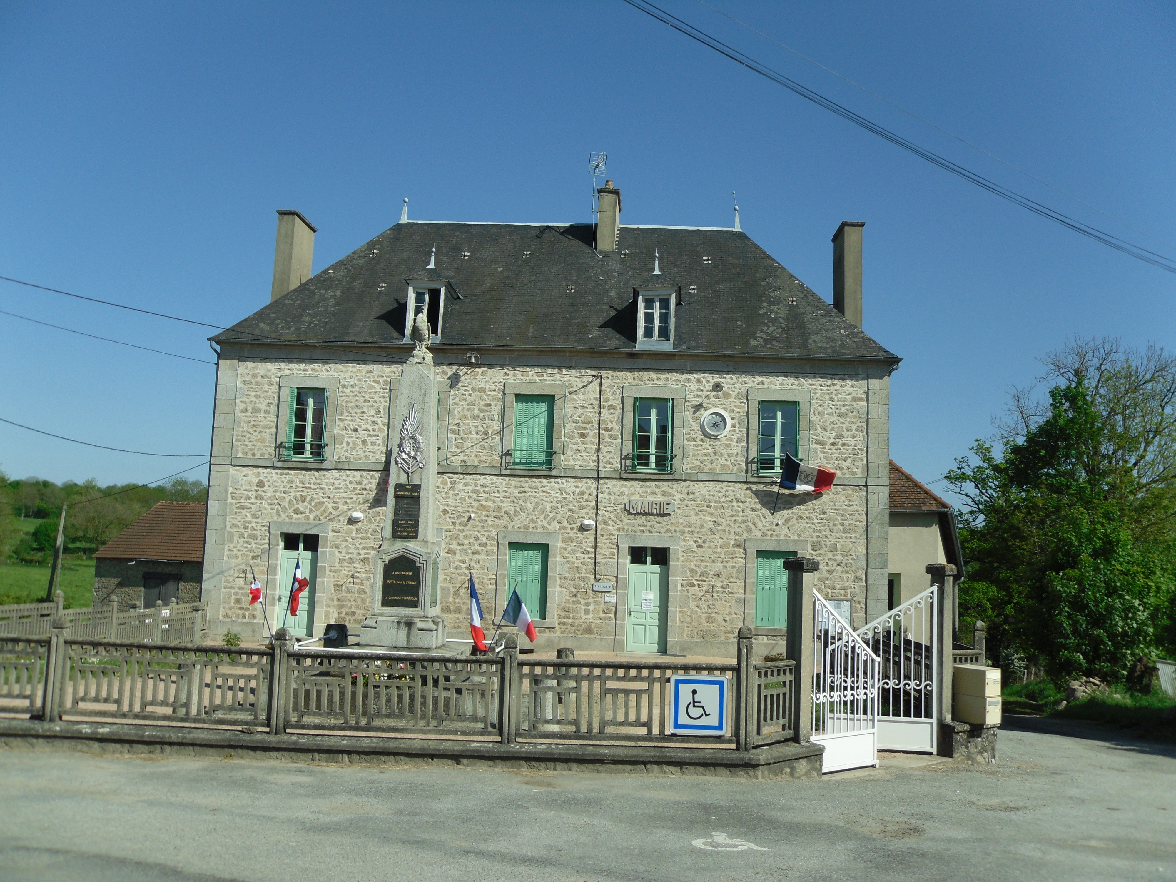 Mairie d'Issoudun